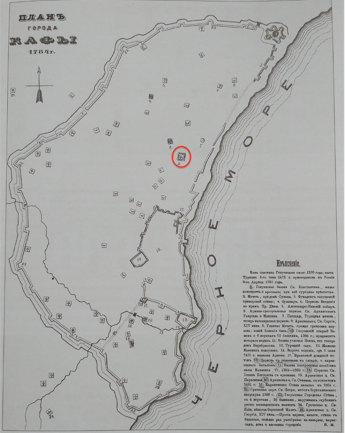 План города Кафы, 1784. Мурзакевич. Зооид. 7. таб.4